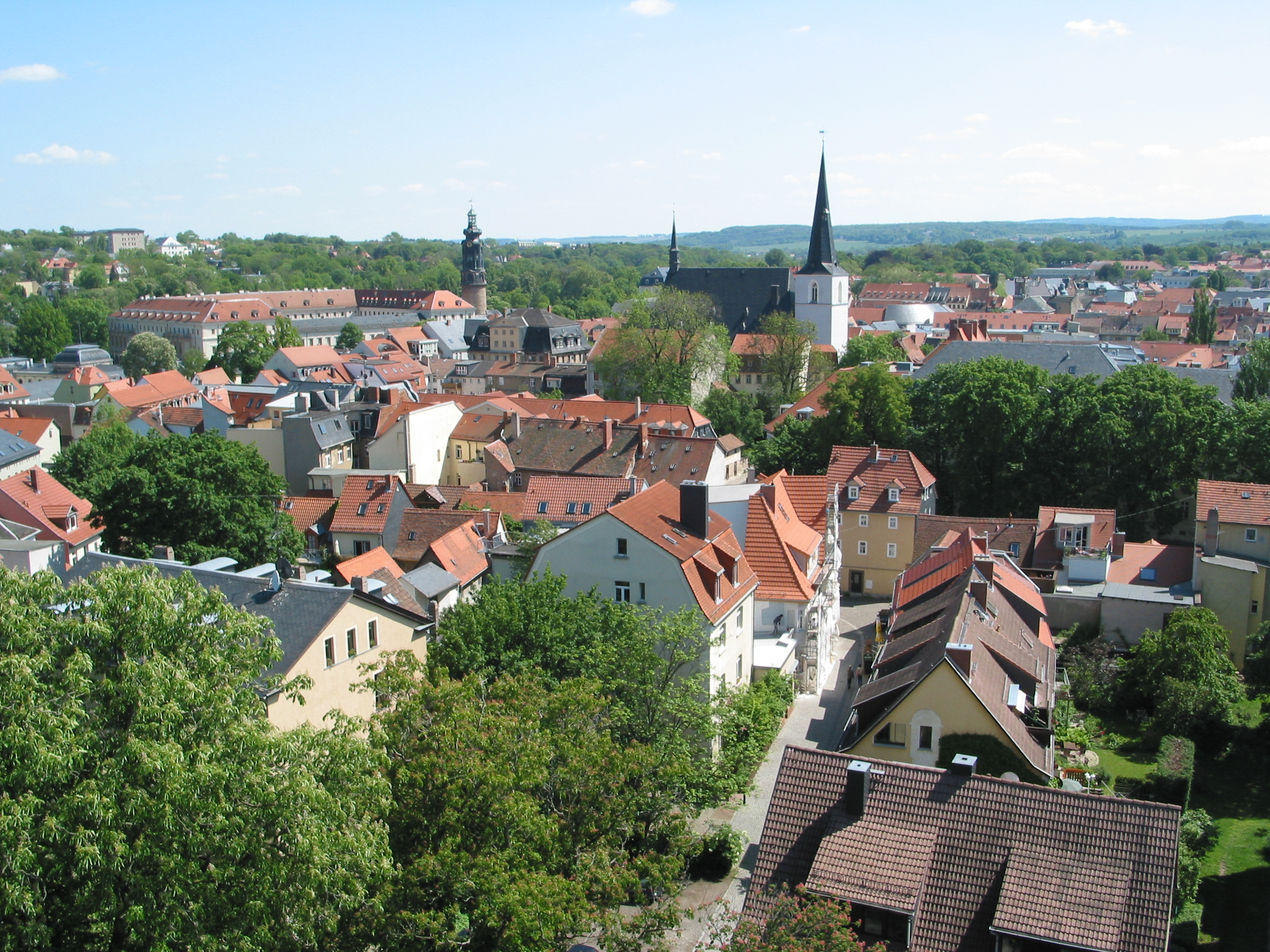 Blick vom Jakobskirchturm zur Herderkirche und dem Residenzschloss Weimar.